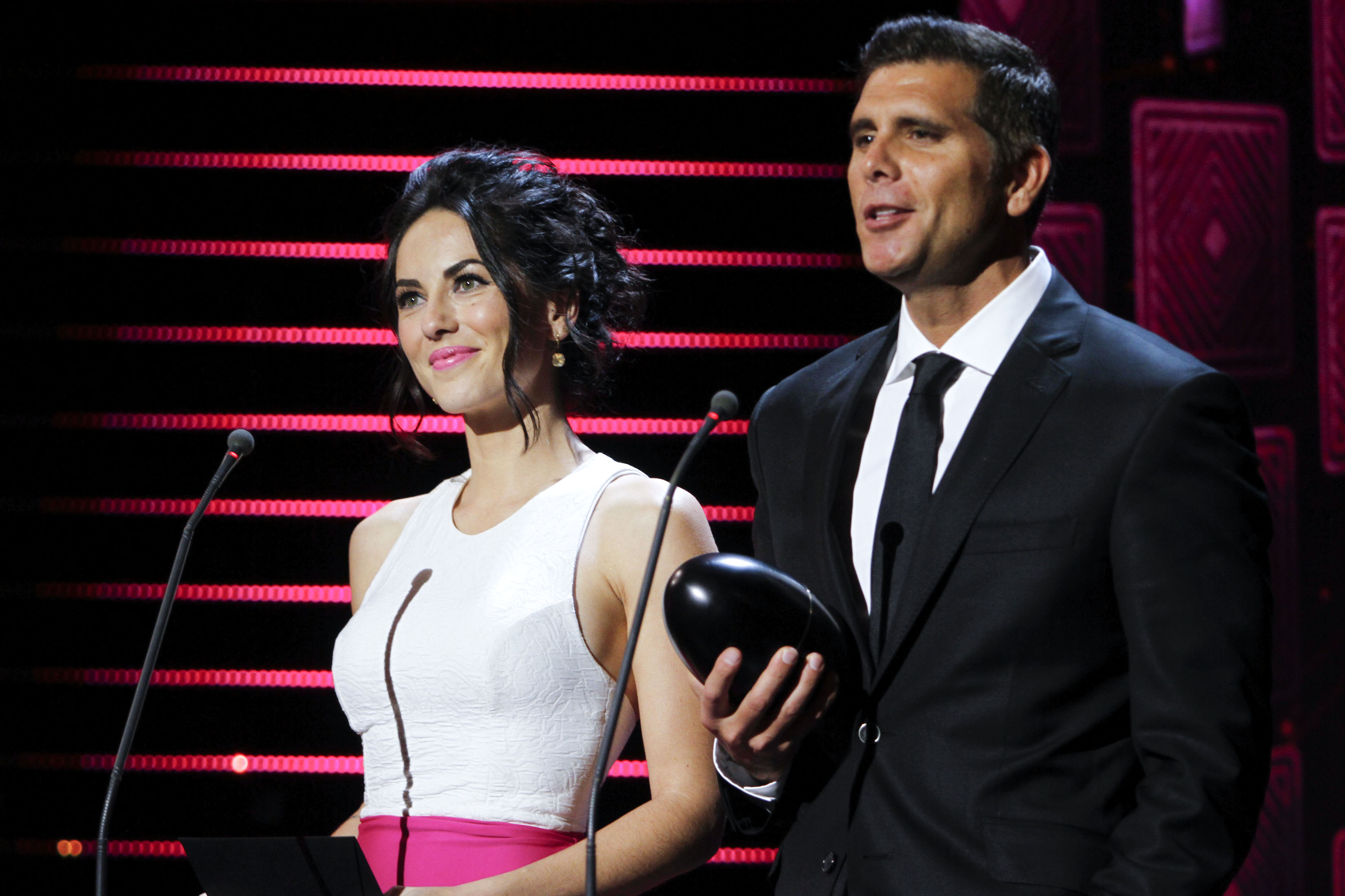 Miércoles 25 de noviembre de 2015. Se realizó la segunda entrega de los Fénix, Premio Iberoamericanos de Cine, en el Teatro de la Ciudad Esperanza Iris, Aquí los los presentadores y cantantes que participaron arriba del escenario.Fotografía: Milton Martínez/Secretaría de Cultura CDMX